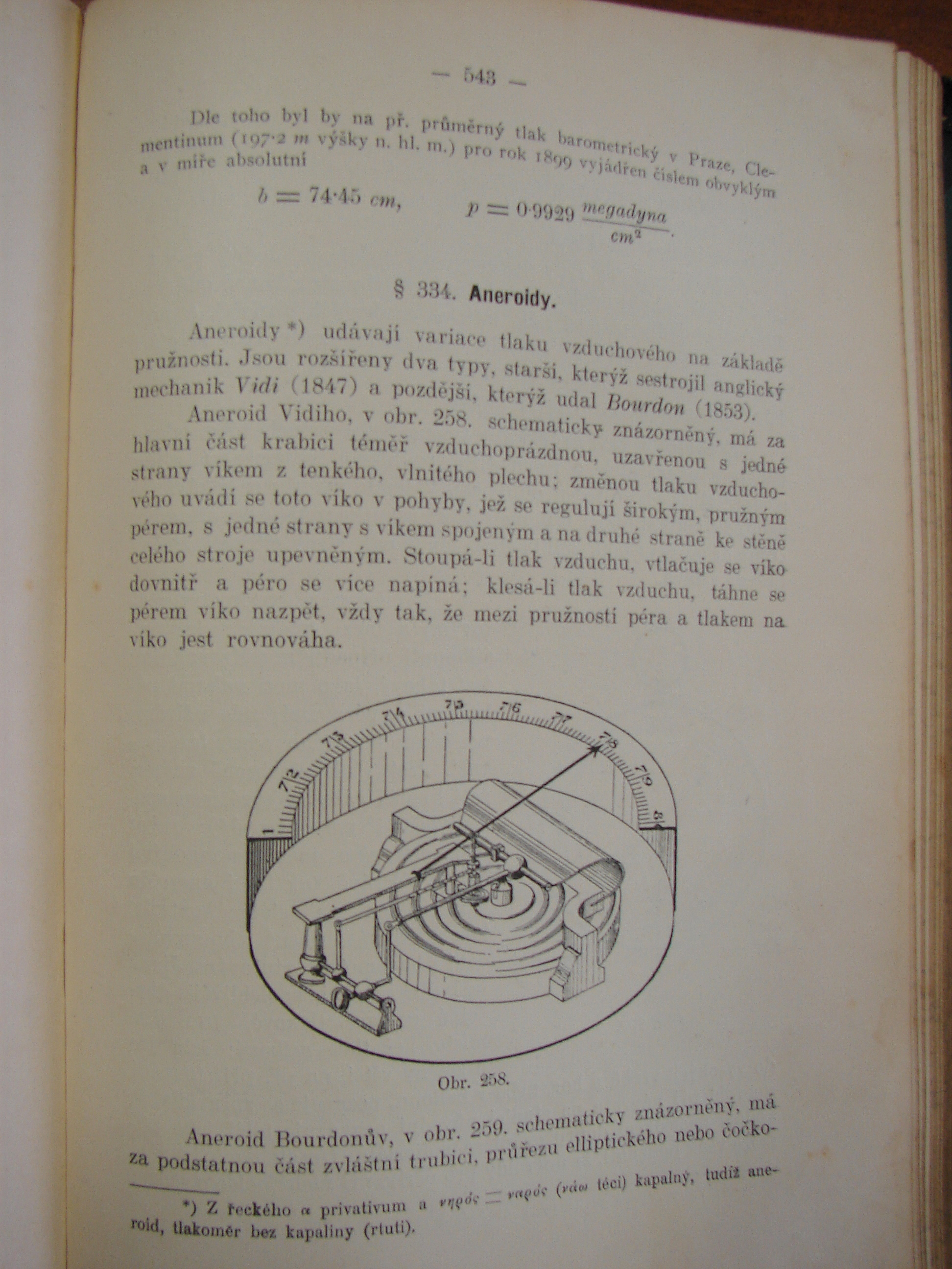 ukázka ze Strouhalovy knížky o mechanice